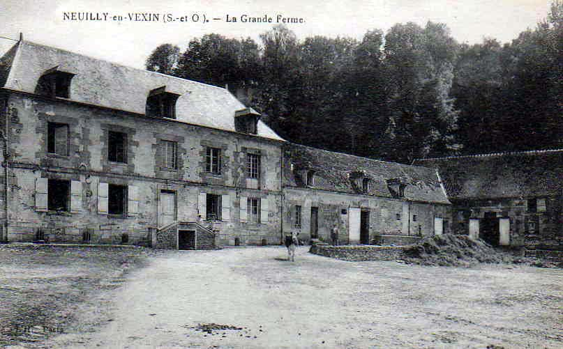 Neuilly-en-Vexin (France) - La Grande Ferme vers 1900